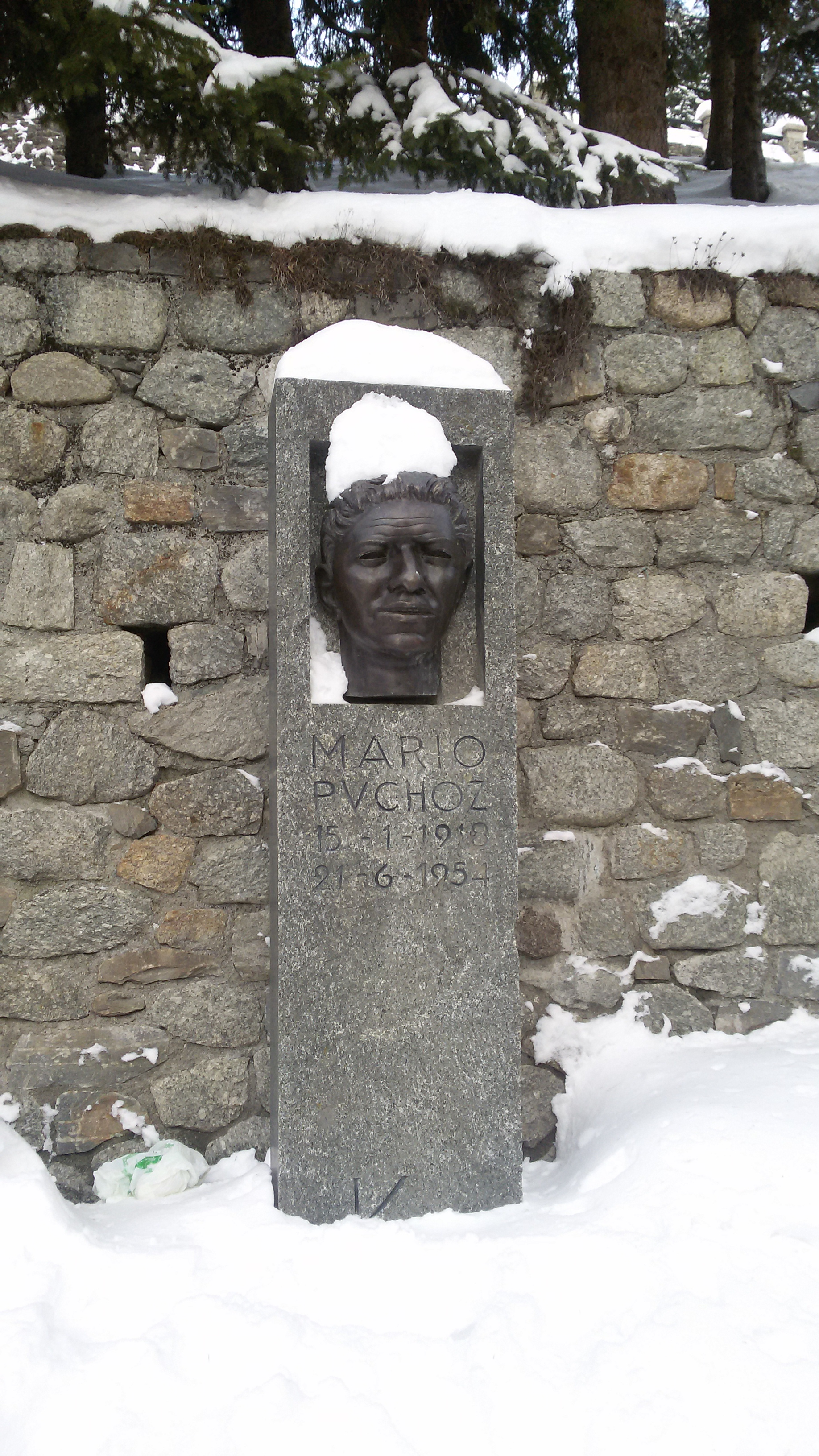 statue de mario puchoz, place abbé henry, à courmayeur